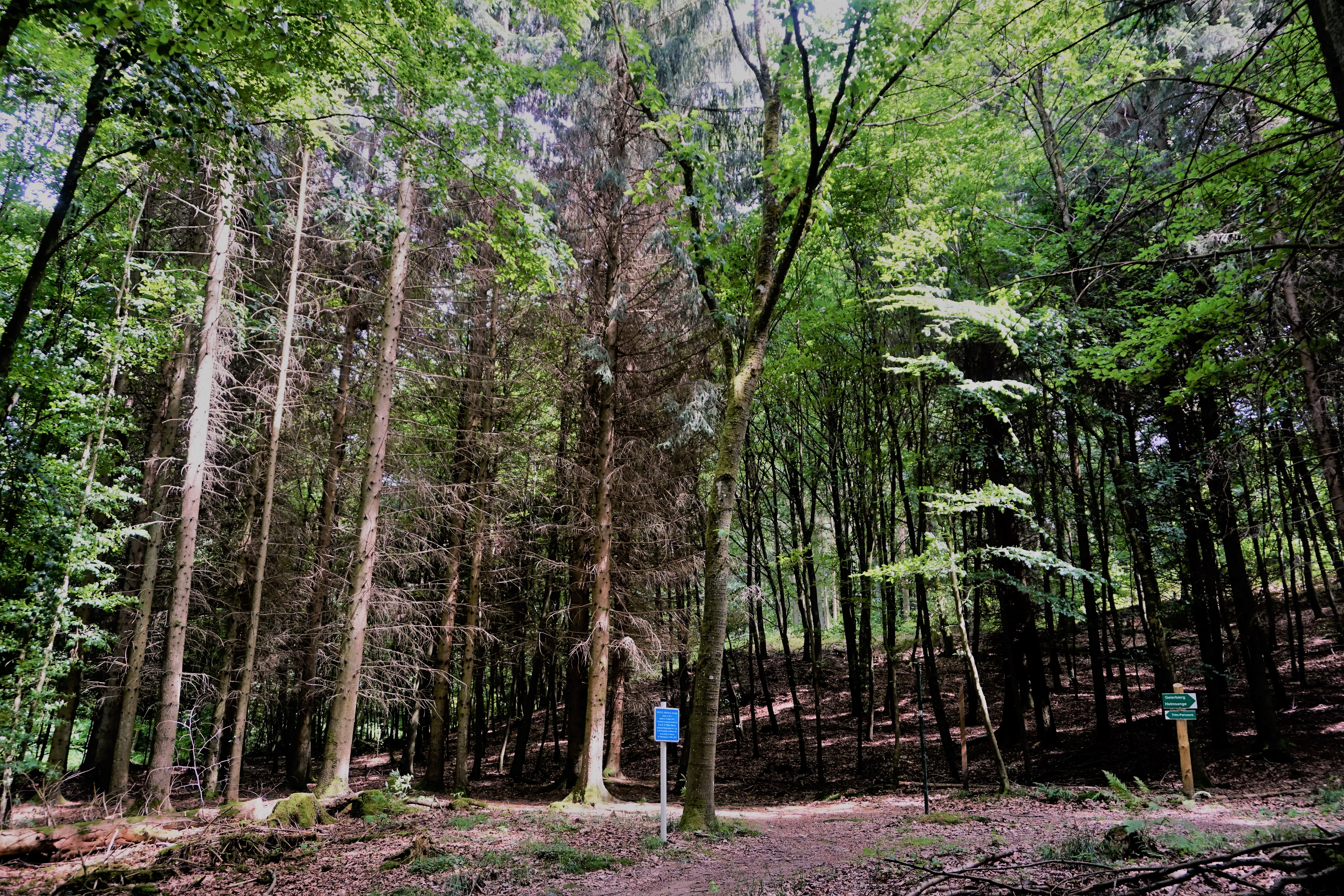 D'Eech vum Prënz Henri am Gréngewald, déi 1979 geplant gouf.